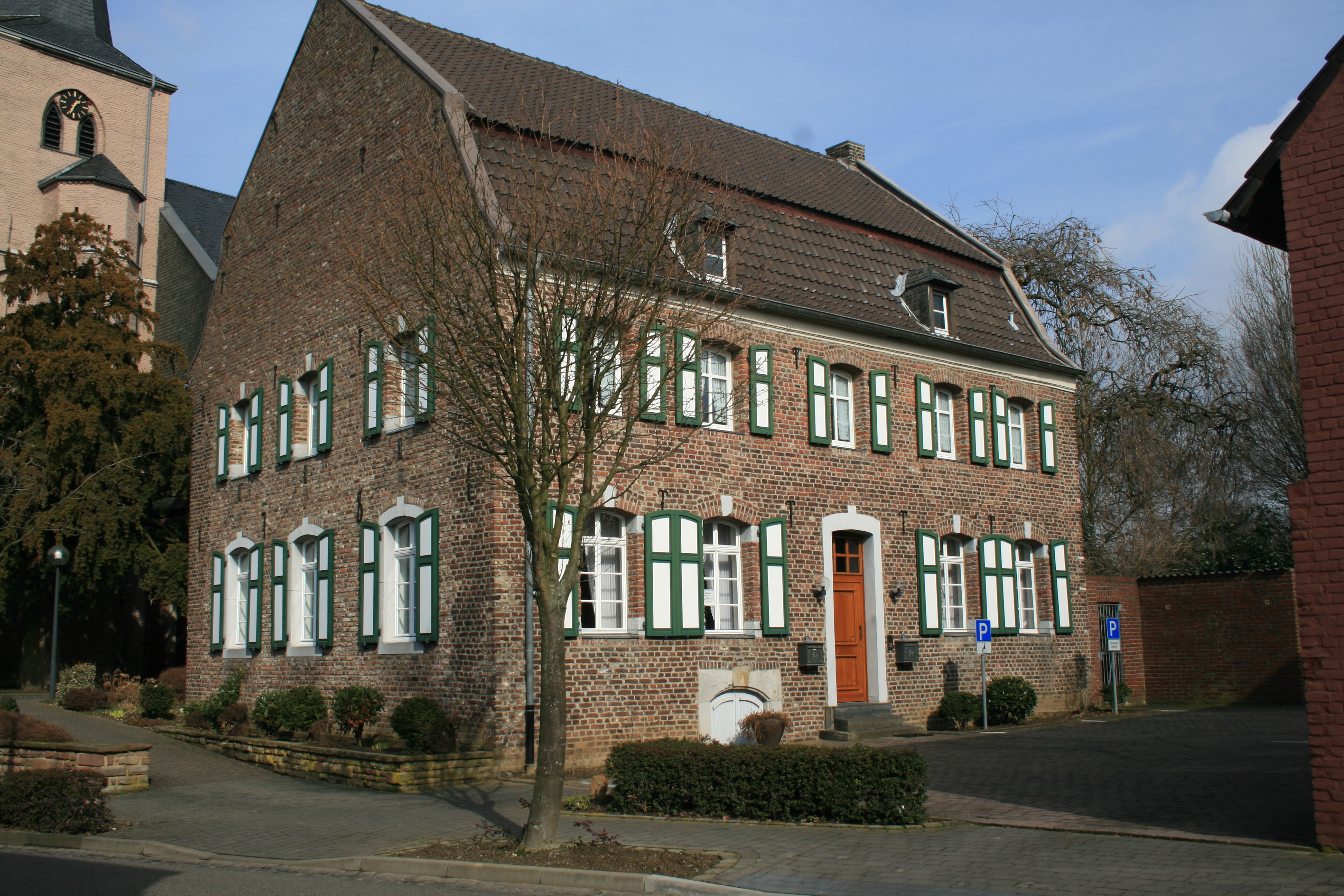 Kath. Pfarrhaus in Geilenkirchen-Teveren This is a photograph of an architectural monument.